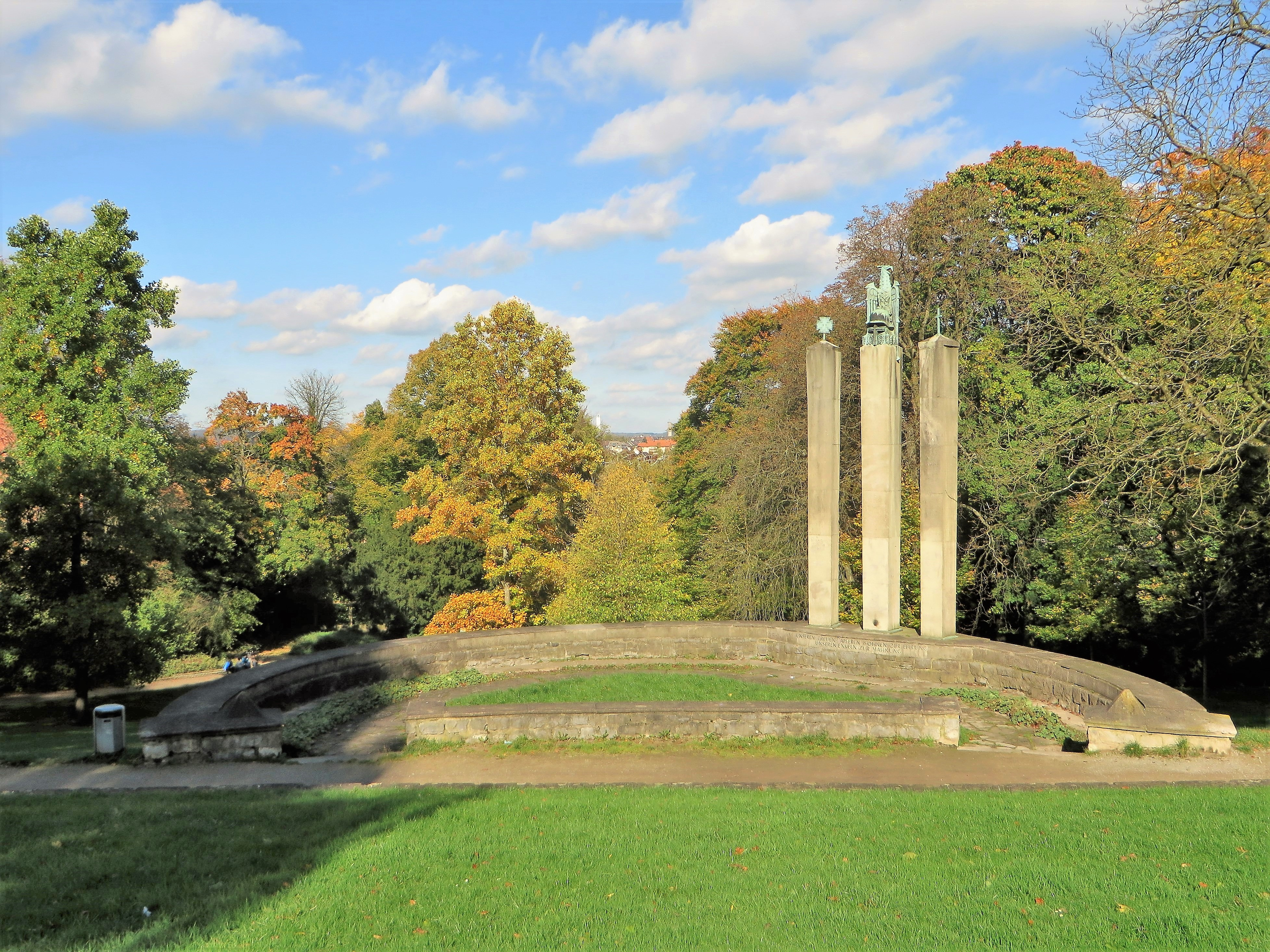 Kriegerdenkmal im Hagener Stadtgarten. Inschrift auf der Sockelmauer: „Unseren Treuen - Tapferen Söhnen zur Ehrung - Unseren Enkeln zur Mahnung“.